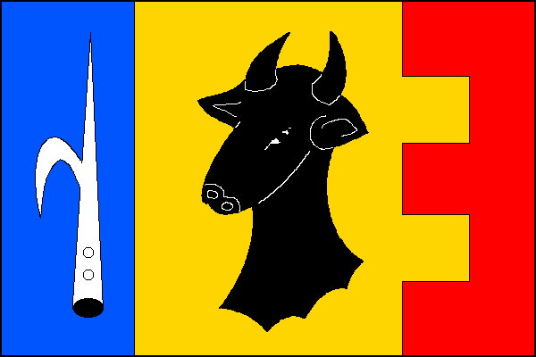 Vlajka obce Lelekovice.